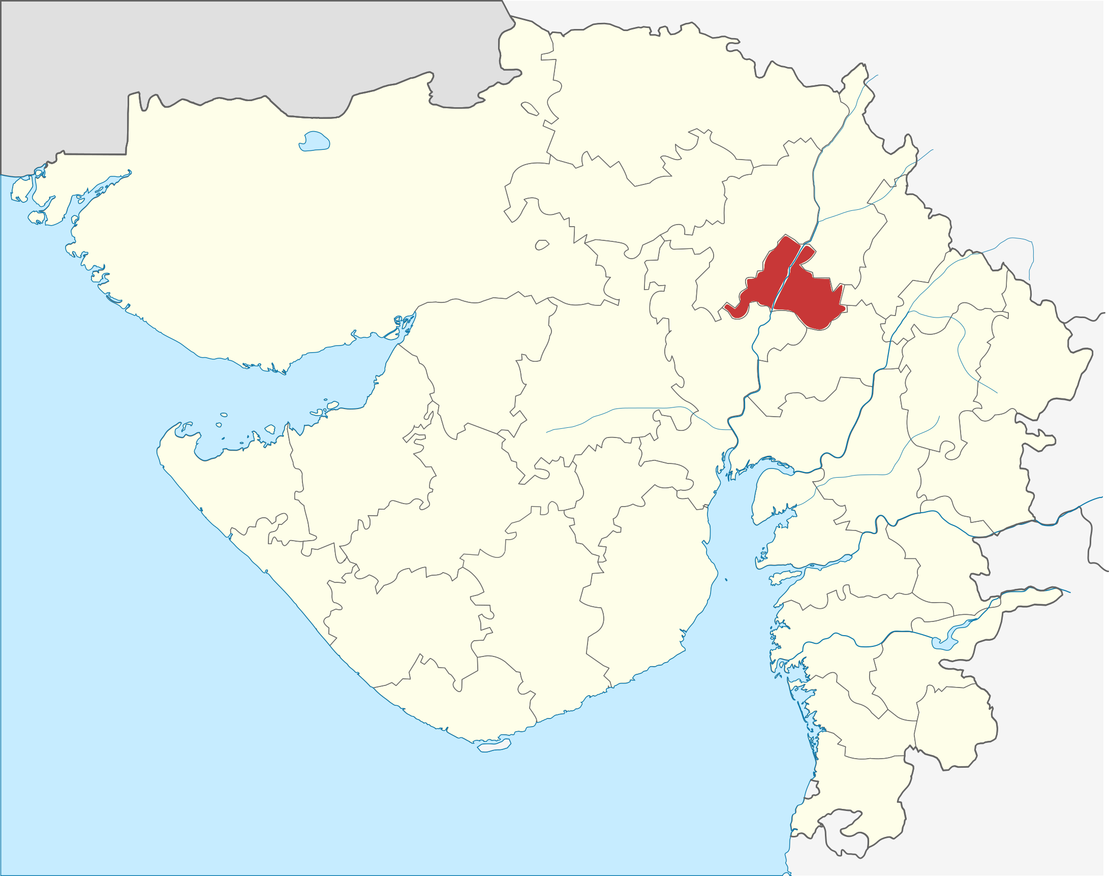 Distrito de Gandhinagar en Gujarat